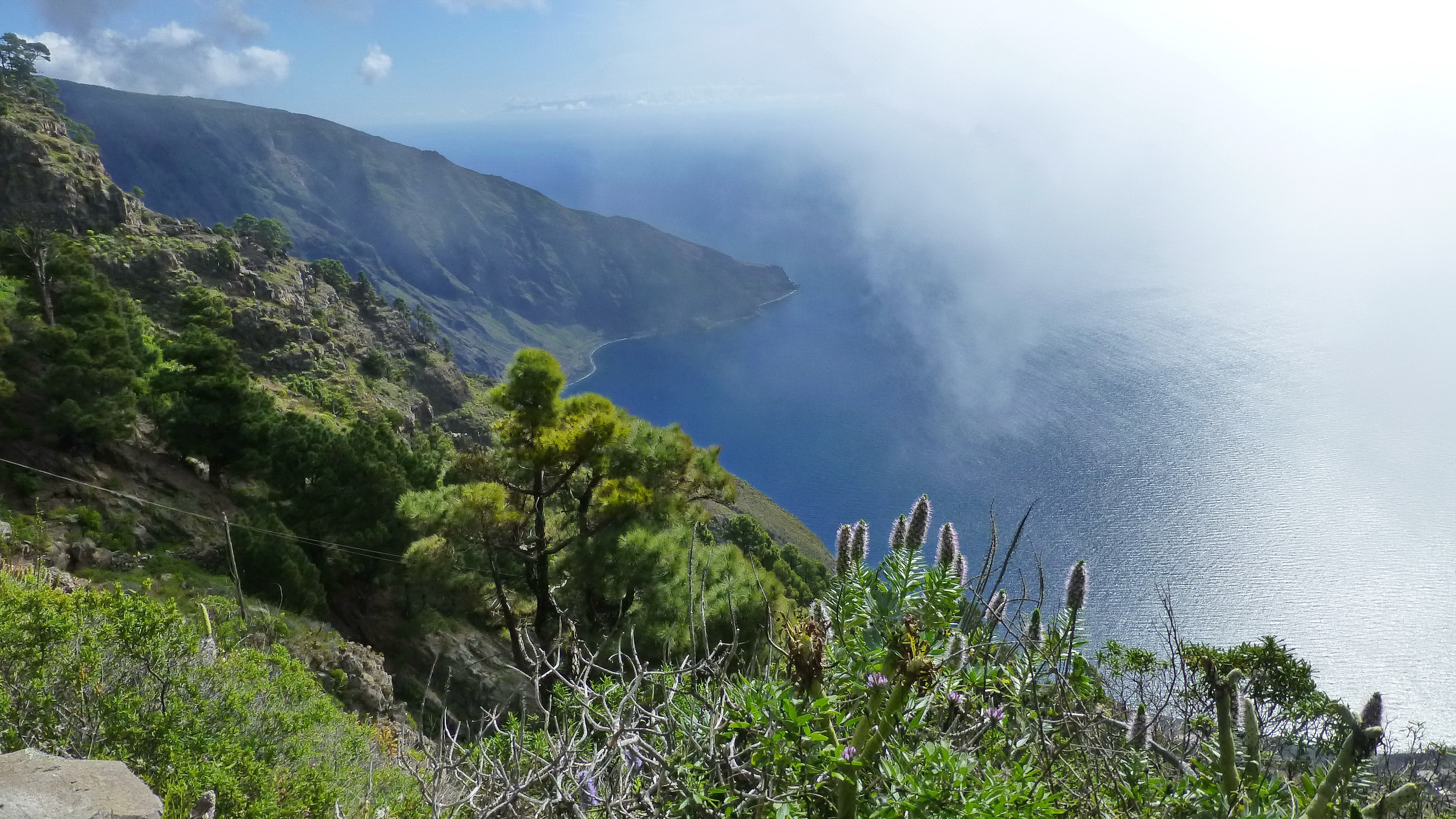 Kanaren-Kiefer (Pinus canariensis) und Hierro-Natternkopf (Echium hierrense), eine endemische Art, im Naturdenkmal Las Playas auf El Hierro, Blick nach Norden auf den Risco de los Herreños